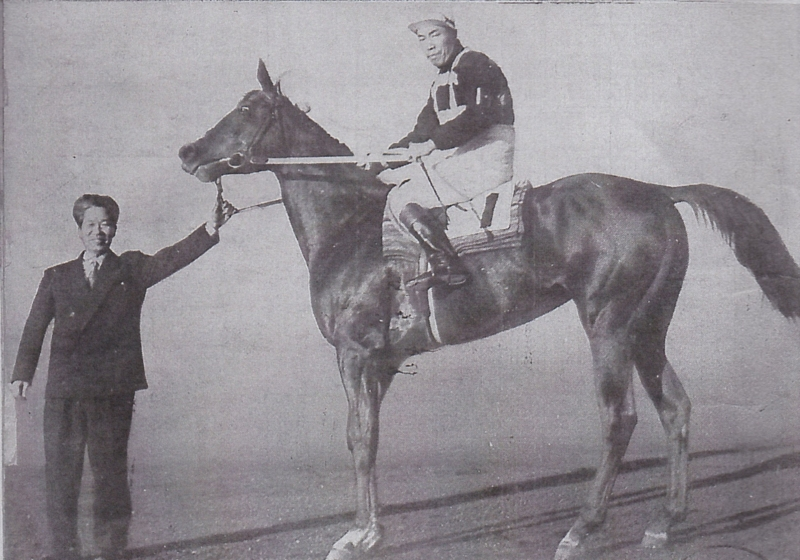 ホウセントと白井新平、田中利衛(鞍上)